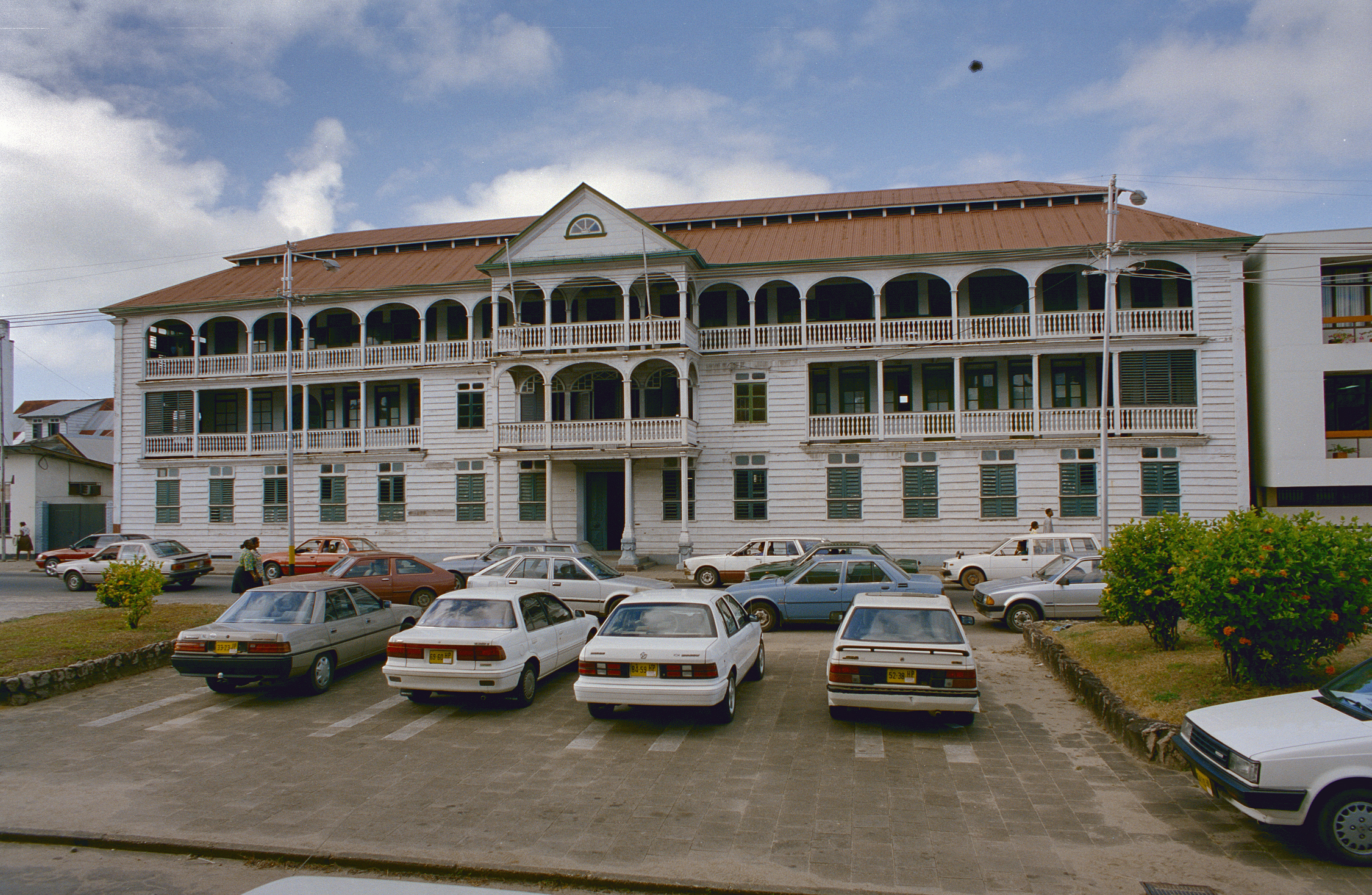 Pastorie van de Paters Redemptoristen: Overzicht voorgevel (opmerking: Suriname Reis Loek Tangel)